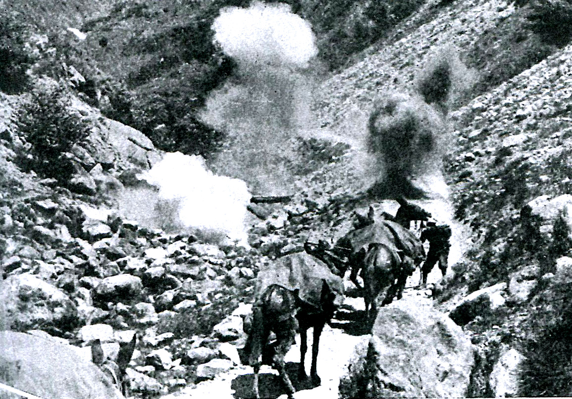 "I trecento della Settima" (regia M. Baffico, 1942) - scena del film